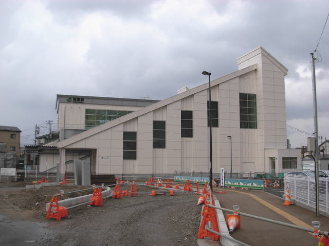 JR関屋駅北口